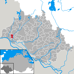 Neu Gülze in Mecklenburg-Vorpommern - district Ludwigslust